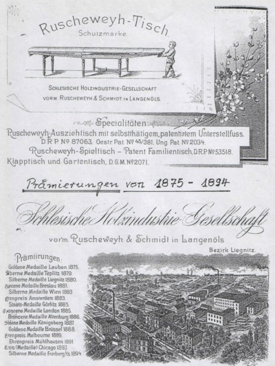 Prämierungen, die die Firma Ruscheweyh Ende des 19. Jahrhunderts erhielt